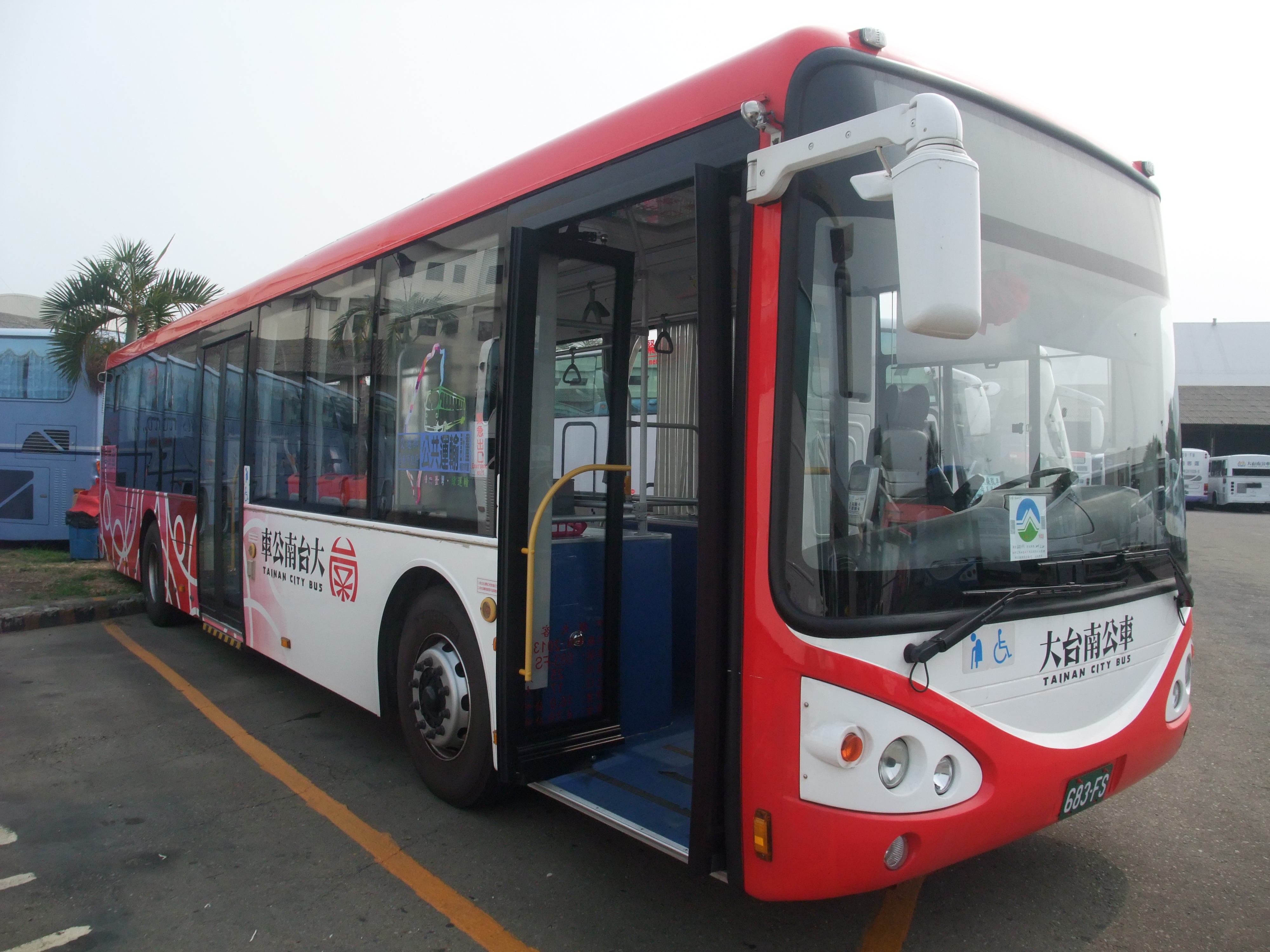 興南客運大台南公車紅幹線用低底盤大客車683-FS 2013年唐榮申沃車體